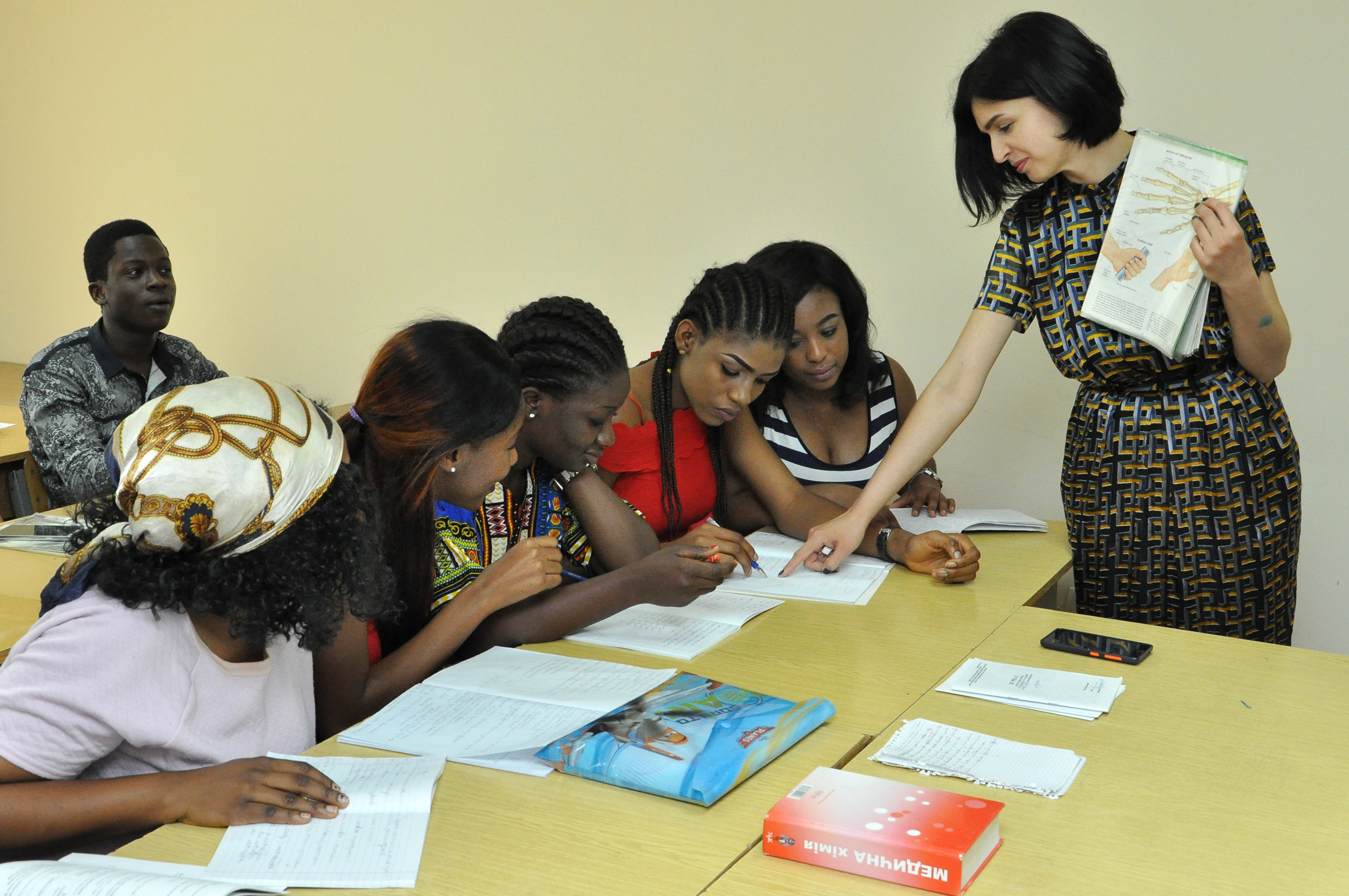 Підготовче відділення для іноземців та осіб без громадянства Тернопільського державного медичного університету імені І. Я. Горбачевського. Урок біології проводить Оксана Гром.